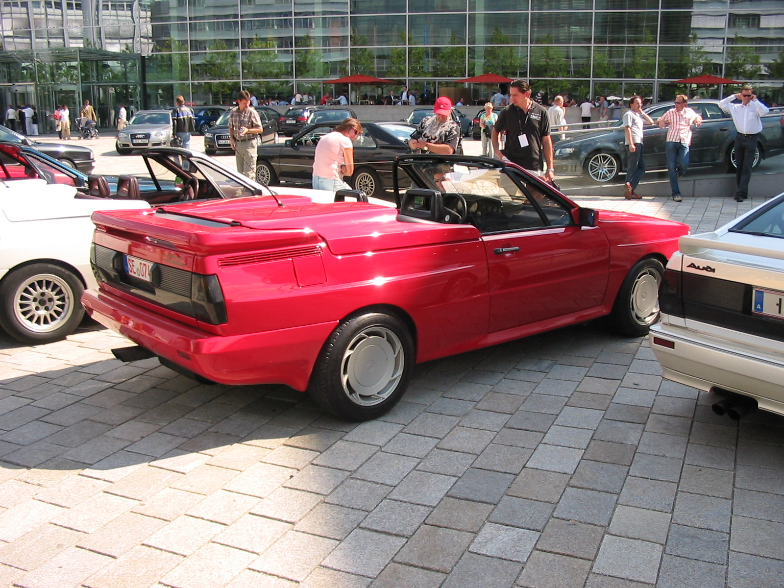 Einer der seltenen Audi quattro Roadster von Treser auf dem Audi Forum in Ingolstadt zum 25-jährigen quattro Jubiläum.